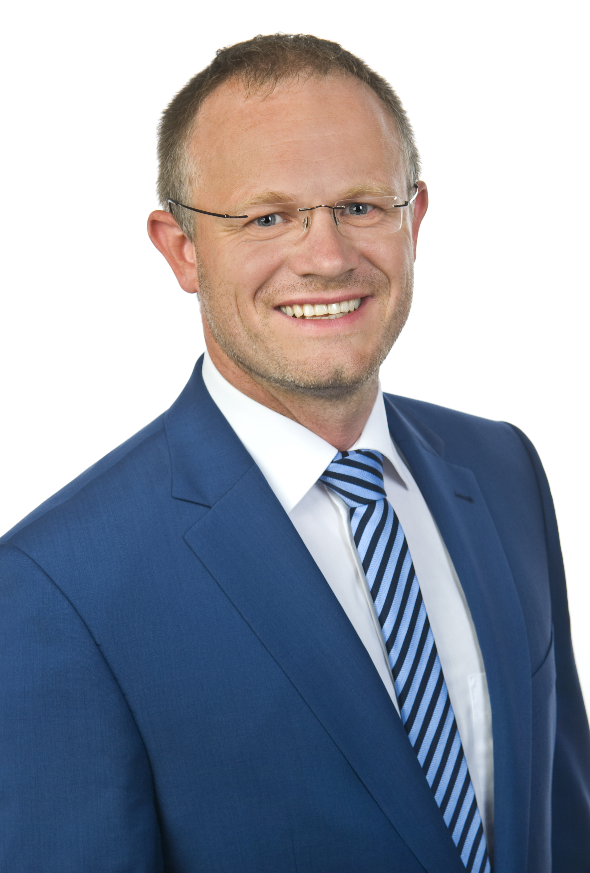 Jan Einig